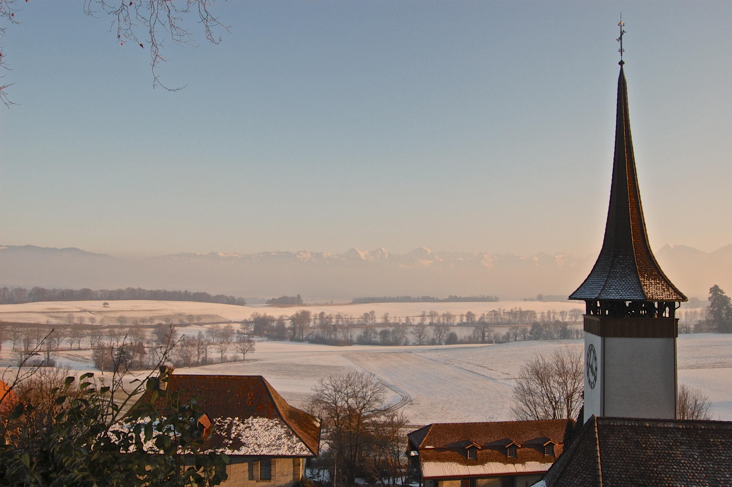 Kirche Gerzensee von Norden, vom Paradiesli aus gesehen: Im Vordergrund Pfarrhaus, Kornhaus und Kirche; im Mittelgrund der gefrorene Gerzensee; im Hintergrund die Berner Alpen mit Eiger, Mönch und Jungfrau